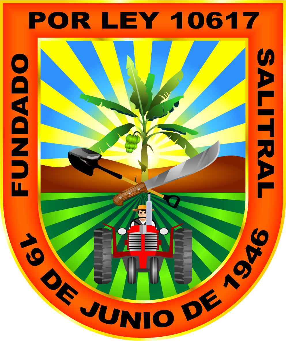 Distrito de Salitral - Provincia de Sullana - Región Piura